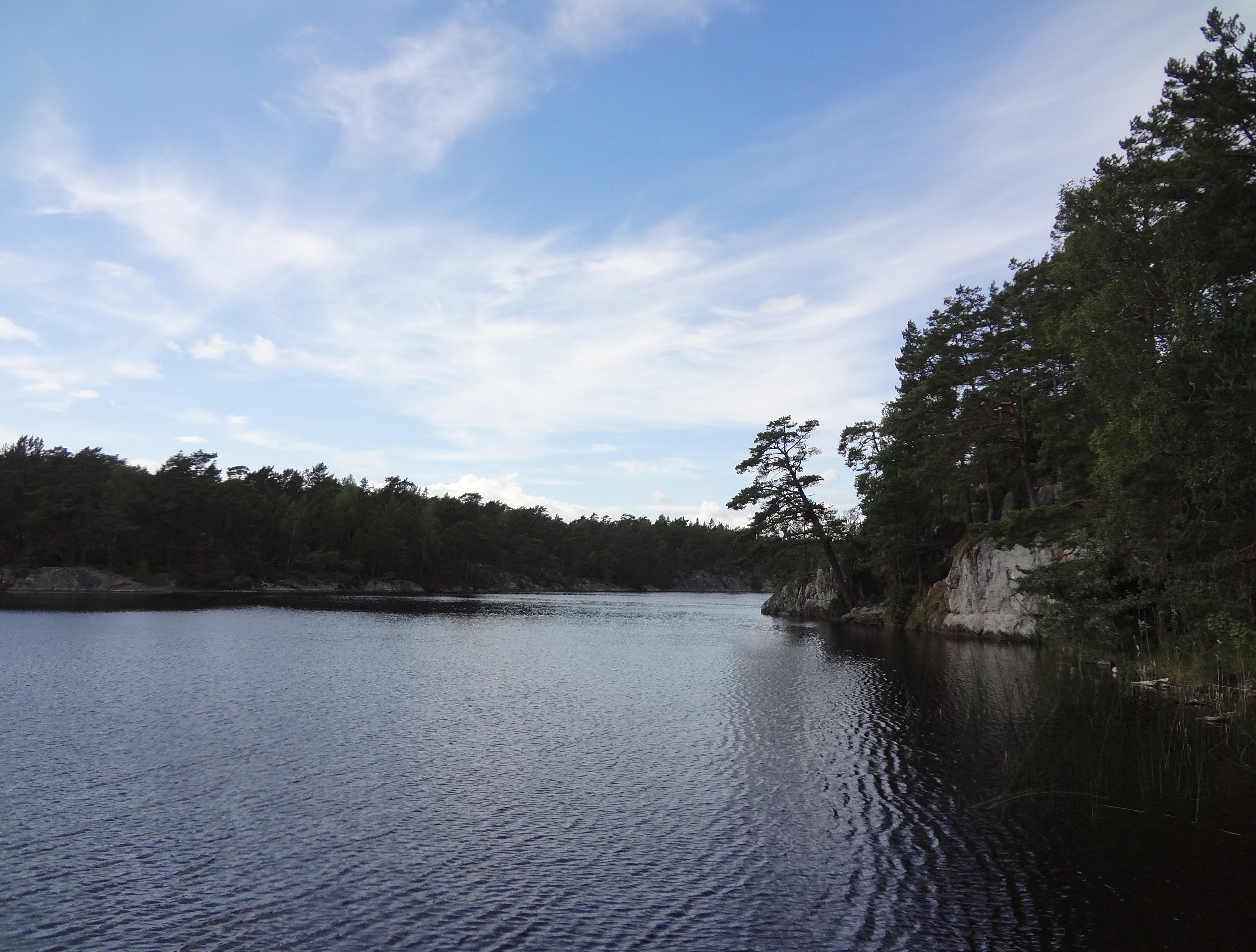 Sjön Hemträsket på Ornö, sydöstra spetsen.